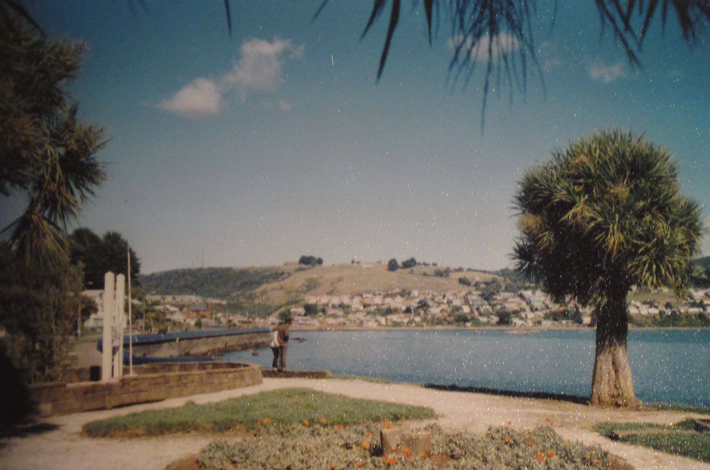 Avenida Salvador Allende, Ancud, Isla de Chiloé, Chile